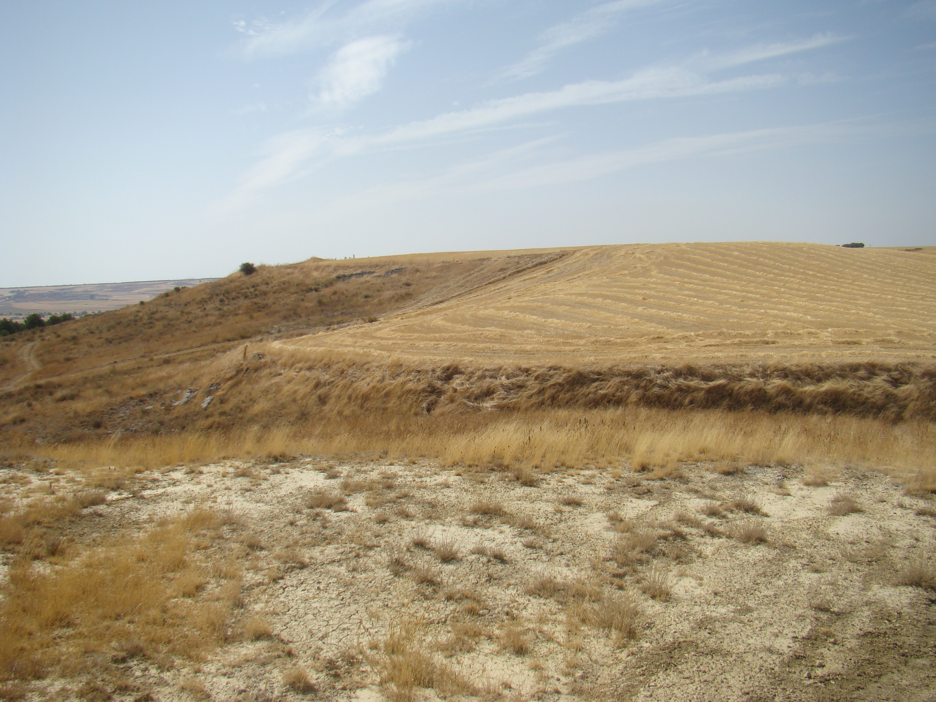 Entorno del Paraje de El Moclín en Medina de Rioseco, provincia de Valladolid (España). Este paraje fue testigo de la batalla de Rioseco entre los ejércitos españoles y franceses (guerras napoleónicas). El lugar es considerado BIC (Bien de Interés Cultural).